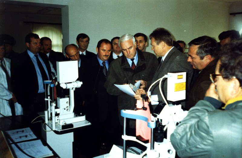 Лазерний офтальмологічний мікрохірургічний апарат СМ – 2001 ТУ У 14220751.008-2000 (1999р.) на базі Nd:YAG- або Но:YAG–лазера з модульованою добротністю.